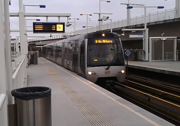 Type SG3 op Lijn D - Tussenwater